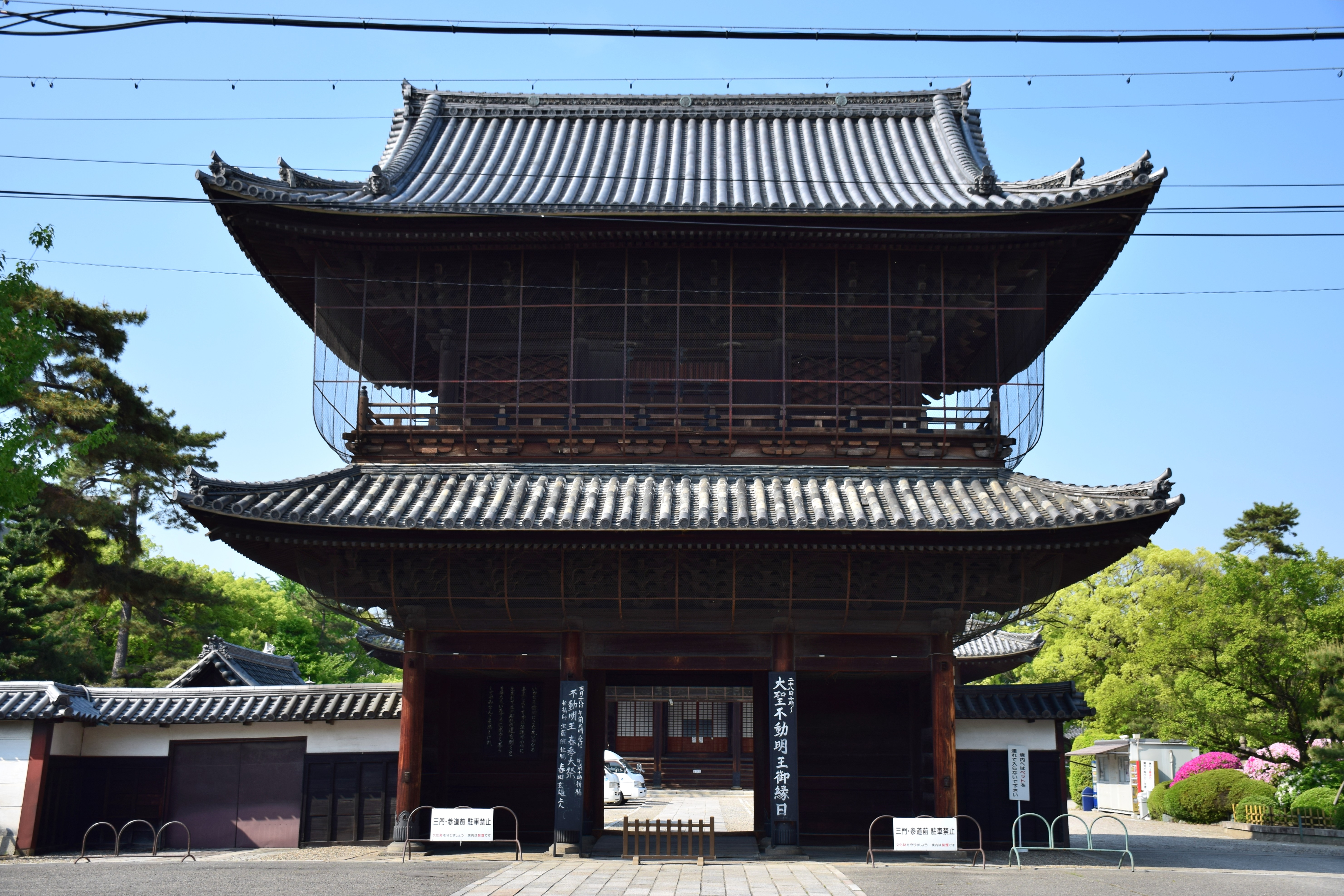 建中寺三門